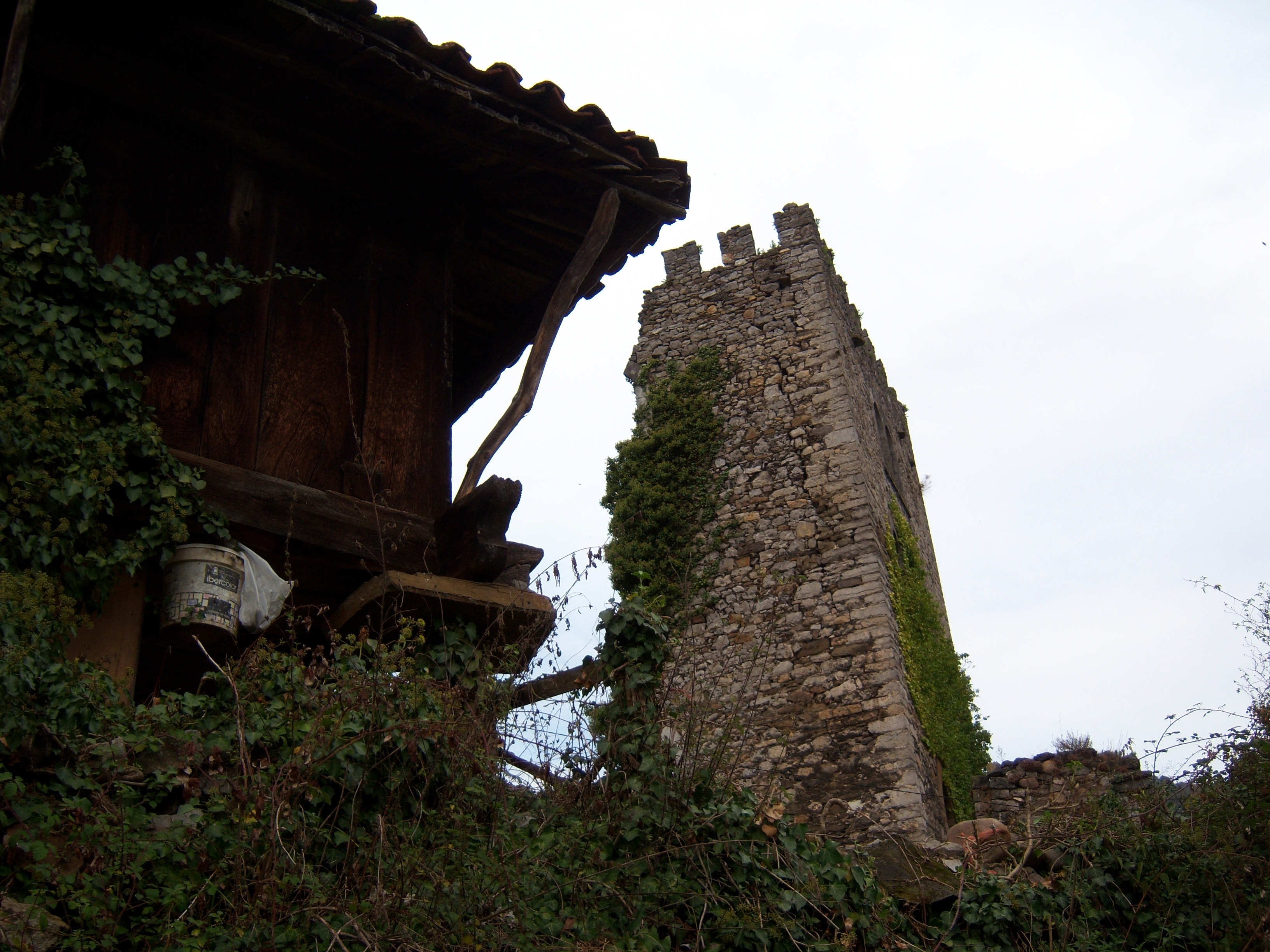 Detalle de la torre vista desde la parte trasera, con un hórreo típico de la arquitectura asturiana acompañando la estampa. Declarado Bien de Interés Culturan en 1975, Soto, concejo de Aller, Asturias.